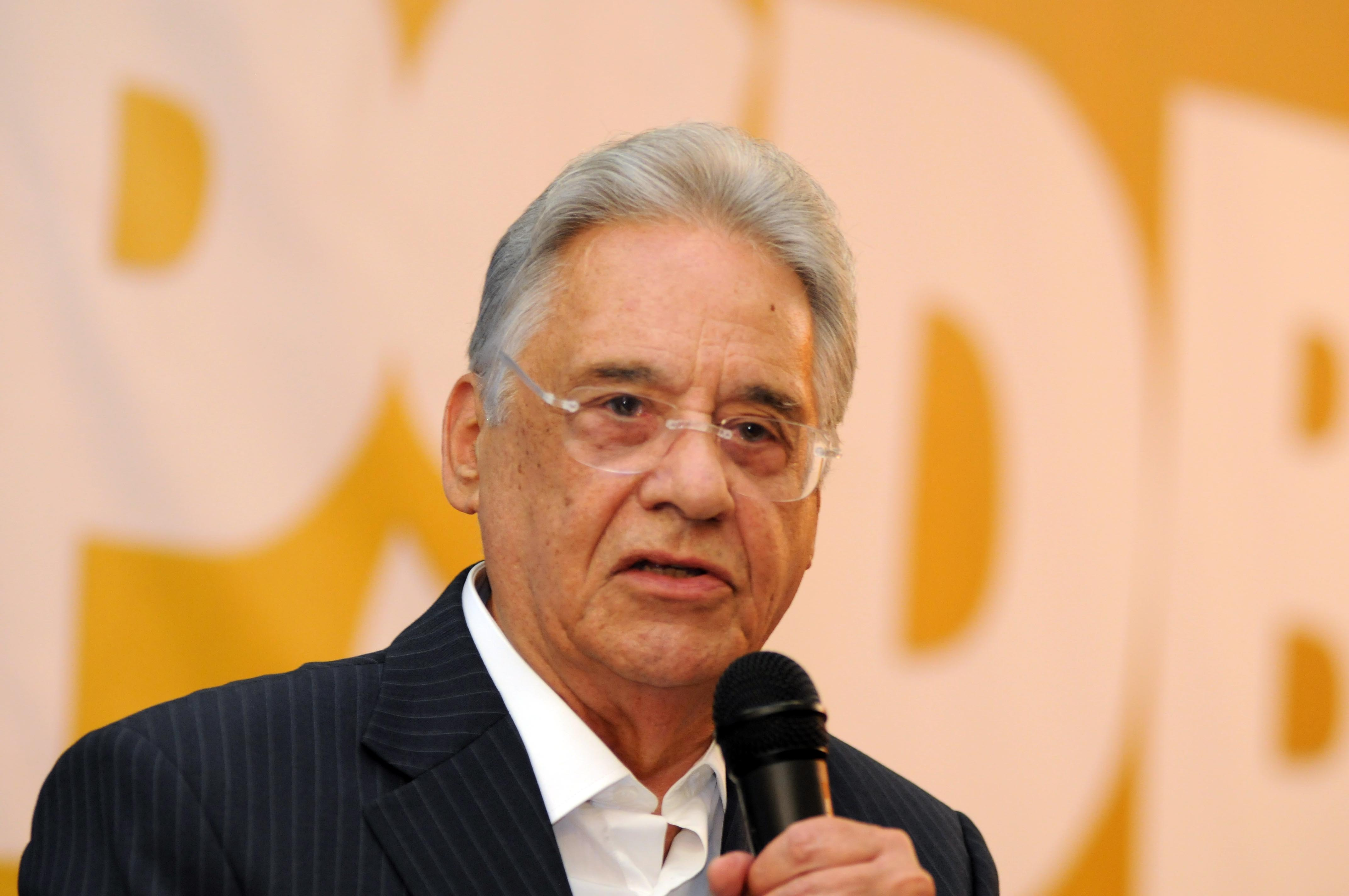 O ex-presidente Fernando Henrique Cardoso proferiu a palestra "O século XXI: Desafios, ameaças e oportunidades", na abertura do ciclo de debates “Minas Pensa o Brasil". O encontro foi promovido pelo PSDB-MG.